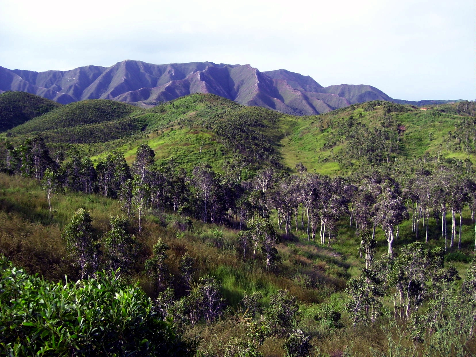 Paysage de savane à niaoulis Malabou, Nouvelle-Calédonie